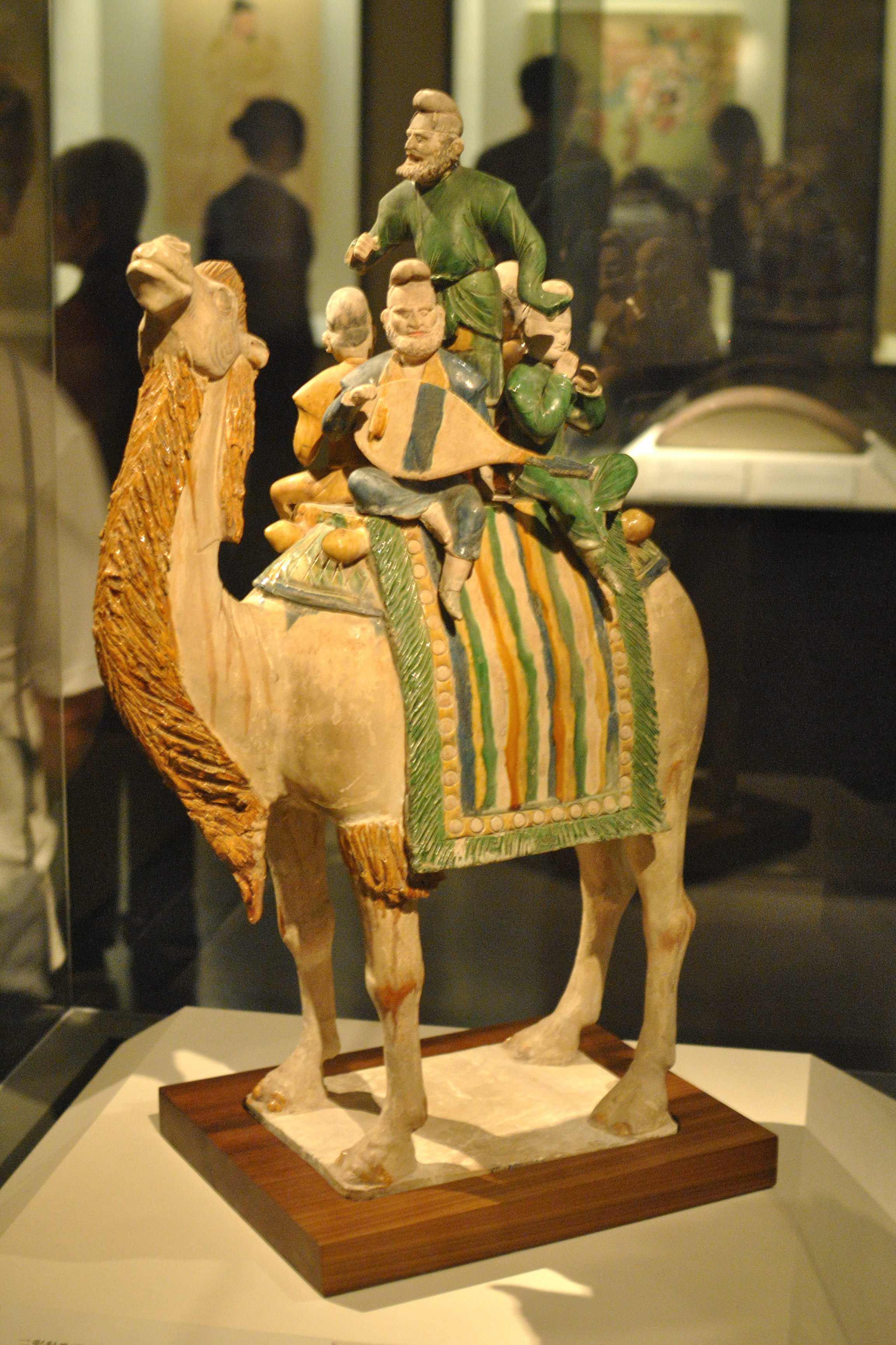 唐代陶骆驼载乐舞三彩俑